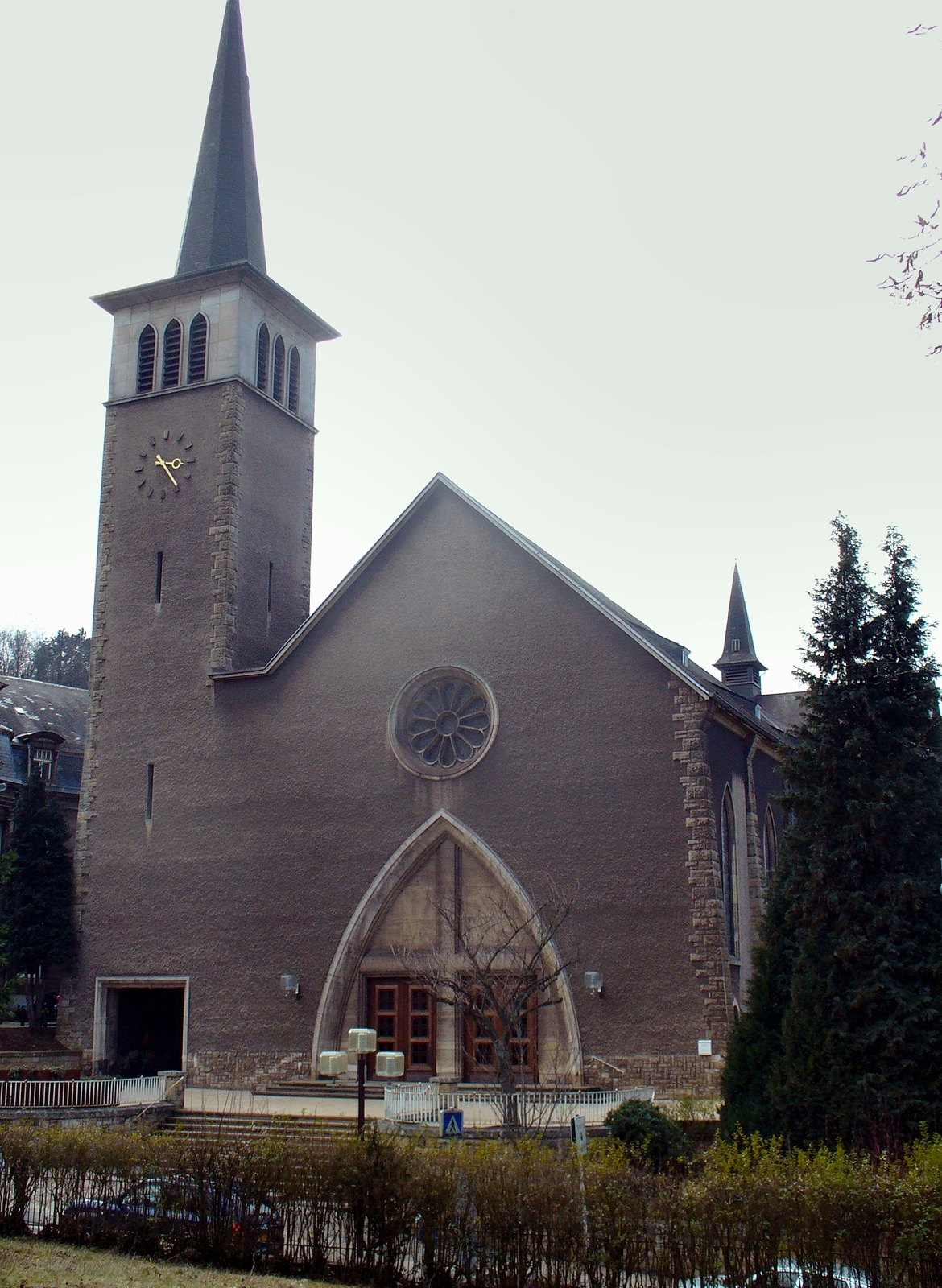 Sujet: lb: d'Kierch vun Déifferdeng. en: church Differdange, Luxembourg. Datum: Mäerz/March 2006; Auteur: Pecalux; Source: selwer geknipst / own work.